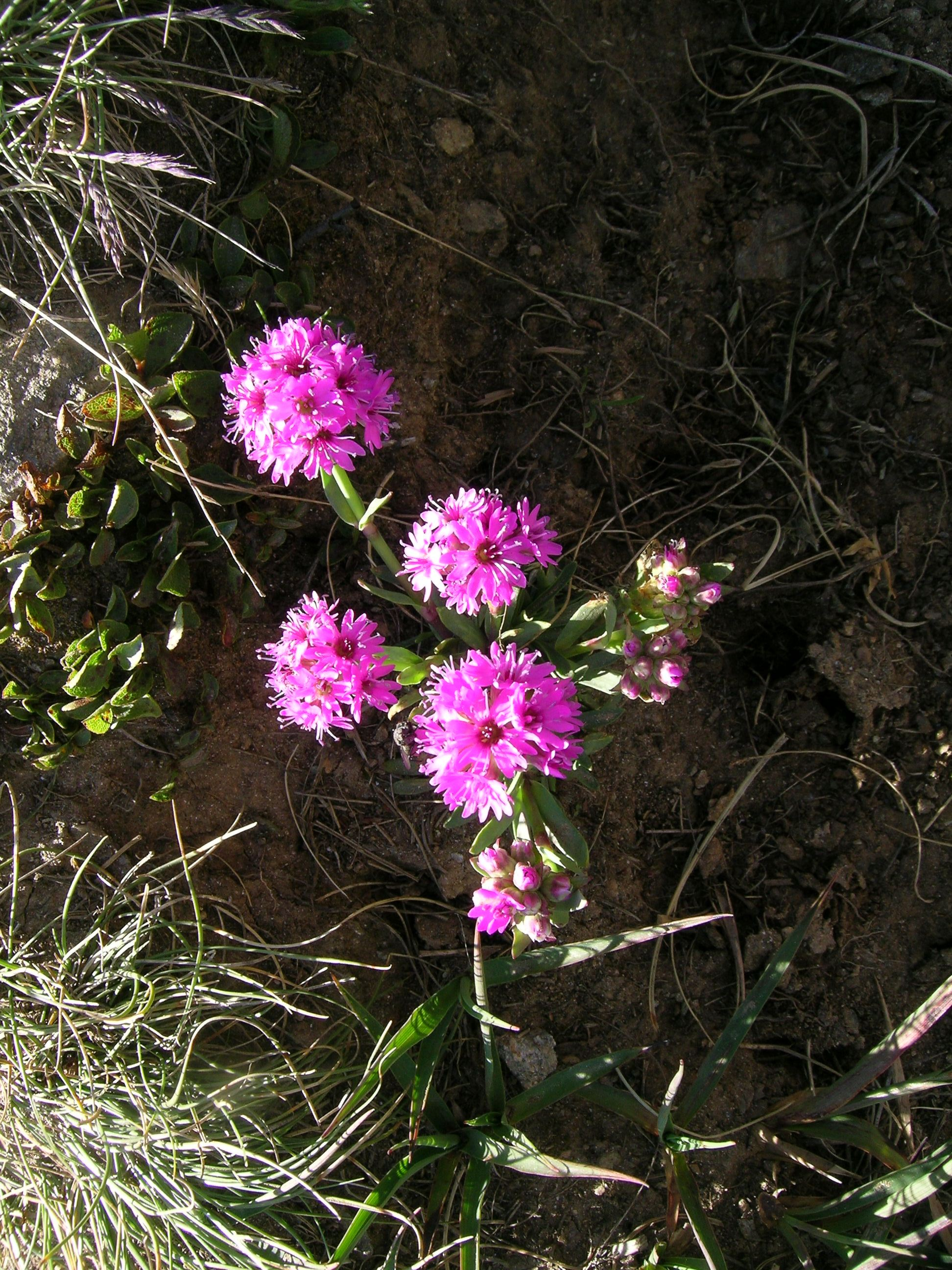 Lychnis alpina, Zermatt (2550 m.a.s), Kanton Wallis, Schweiz